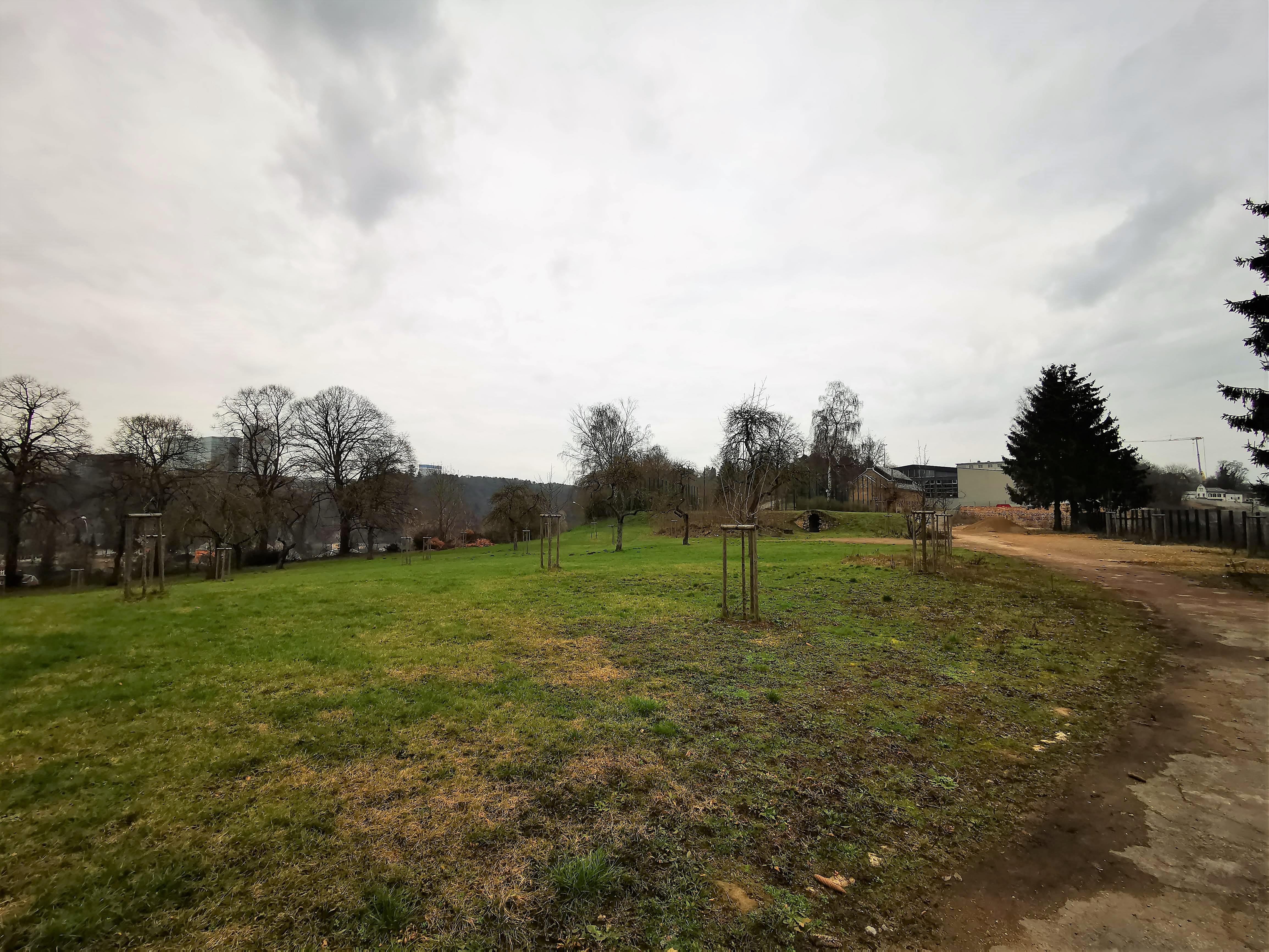 Luxembourg, plateau du Fetschenhof. À l'arrière-plan l'ancien magasin de poudre du Fort Rubamprez et les bâtiments du Sportlycée.